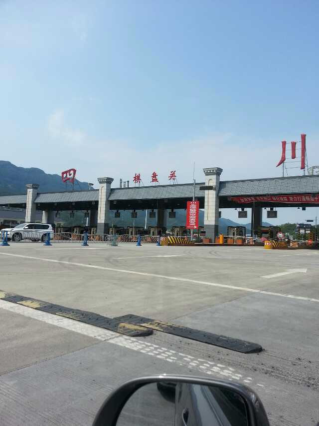 京昆高速棋盘关收费站